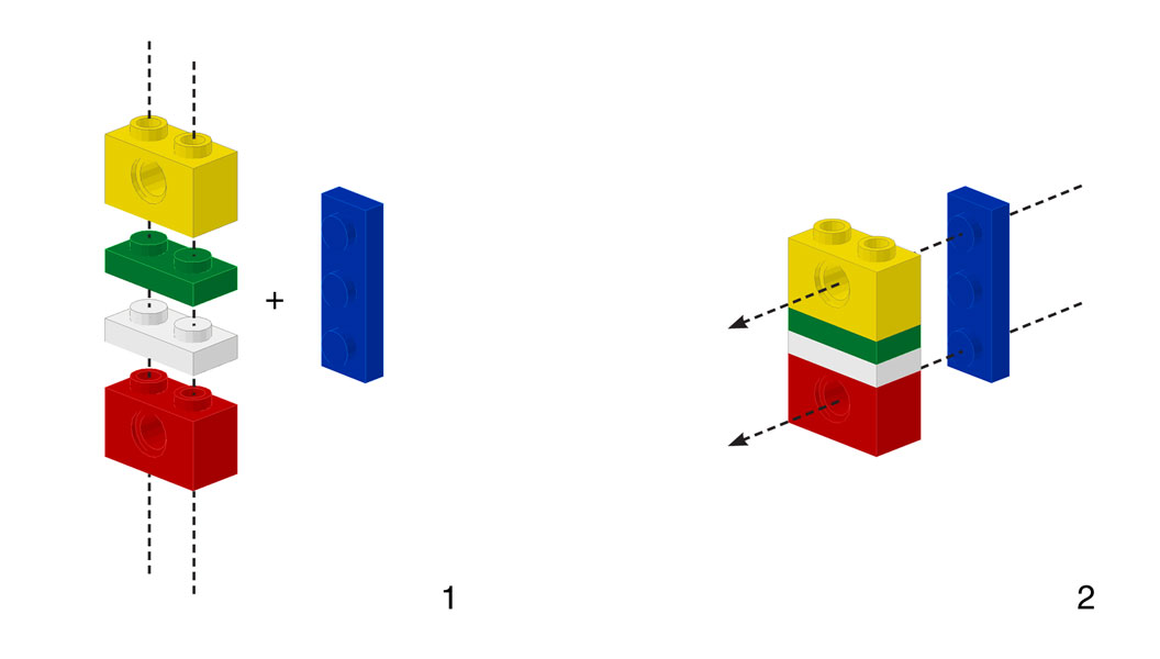 базовый принцип соединения кирпичиков Lego